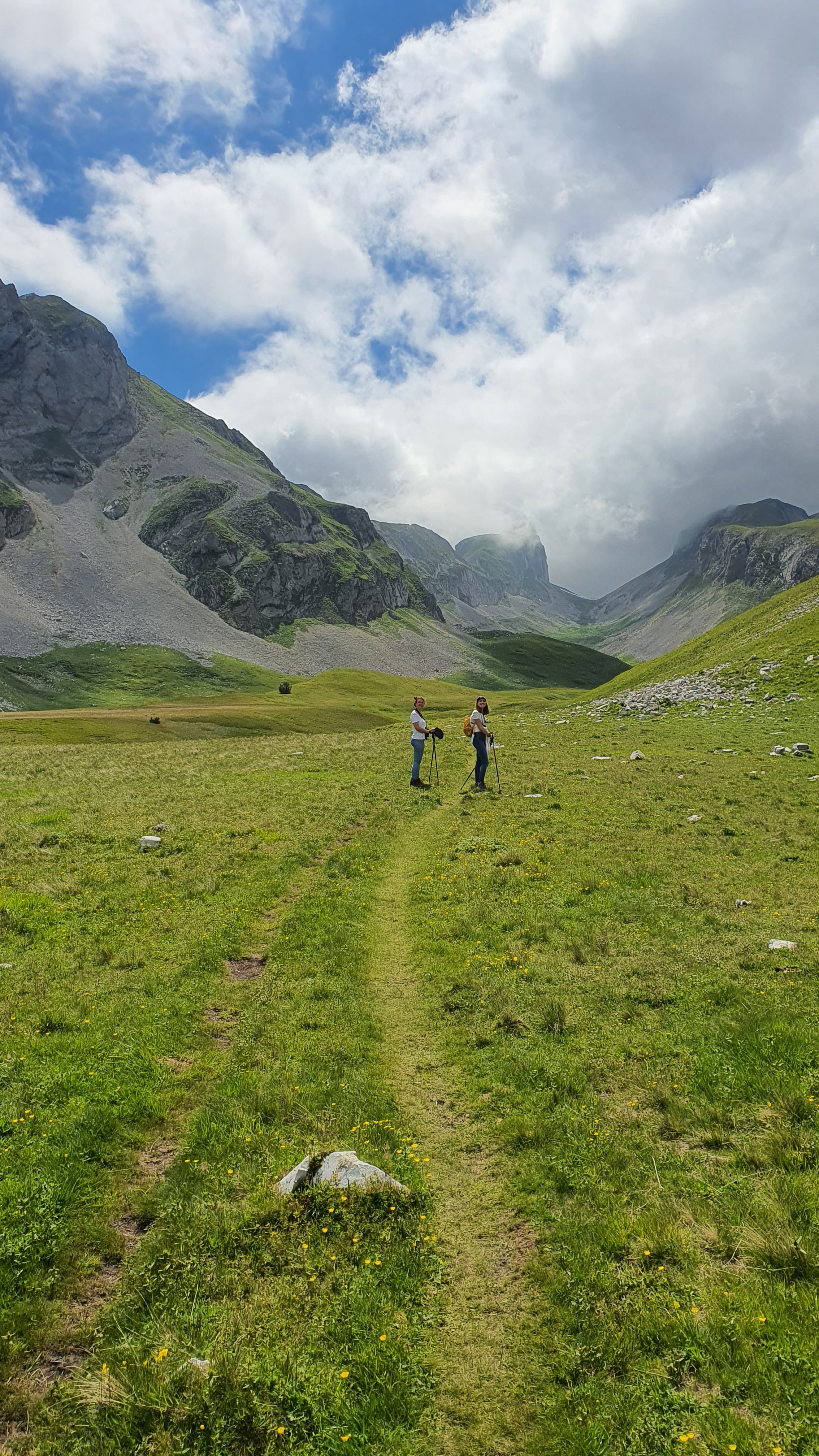 sur le GR 94 sous le col des Aiguilles